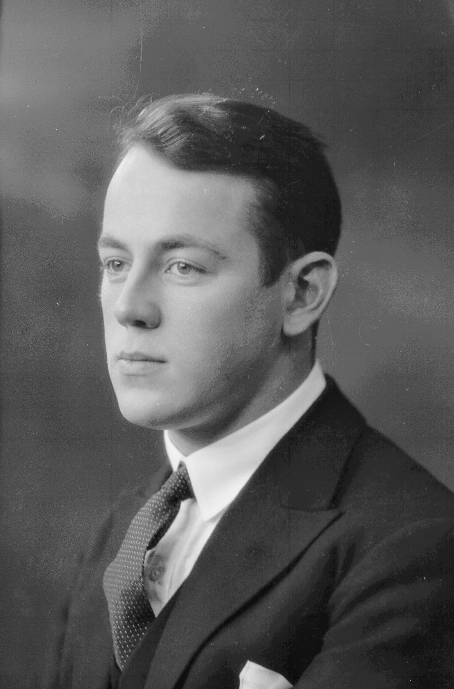 Direktør Ingemann Torp (1894–1976).